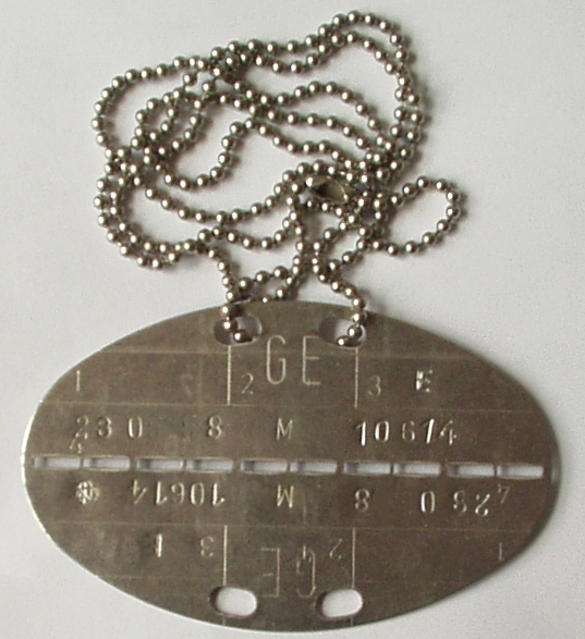 Foto einer Erkennungsmarke der dt. Bundeswehr von 1982